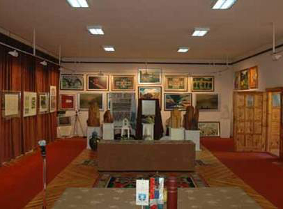 Градска галерија Вишеград смјештена у склопу Дома културе.